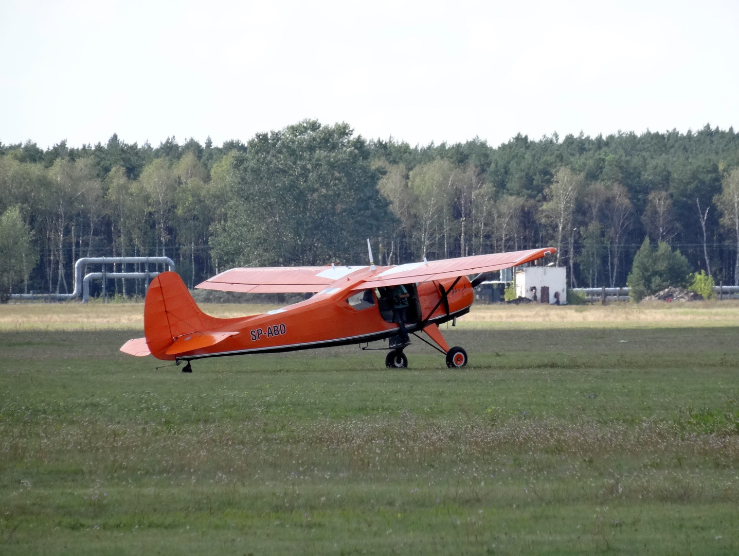 Lotnisko Aeroklubu Bydgoskiego Bydgoszcz-Biedaszkowo